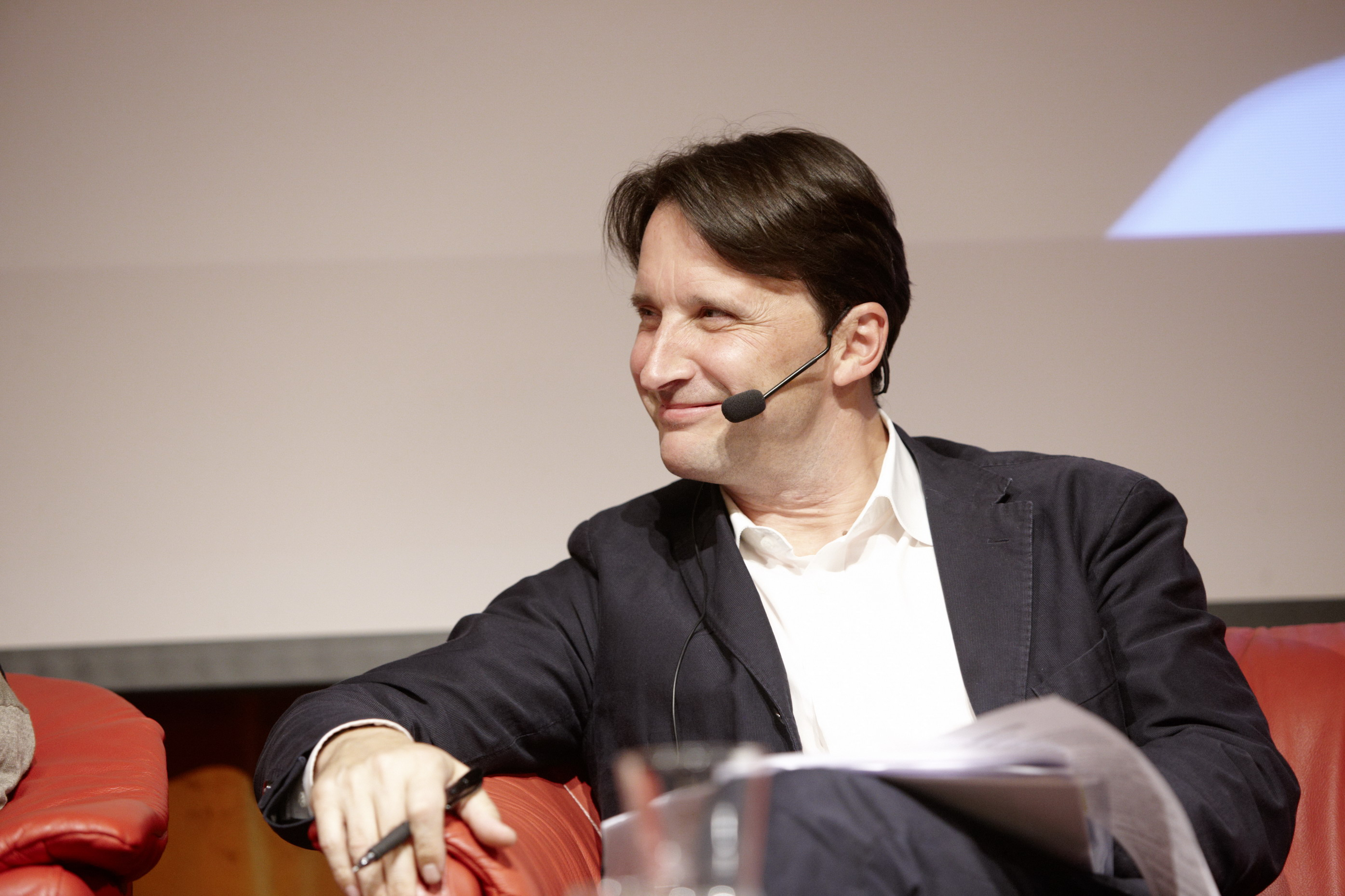 Martin Traxl (ORF) moderierte am 20. September das Symposium zum Thema “Wandern. Bewegung in Raum und Zeit”. Zu den Referenten zählten der Künstler Michael Höpfner, die Galeristin Irmgard Bohunovsky, der Journalist und Autor Axel N. Halbhuber sowie “Skyrunner” Christian Stangl. Fotos (c) Johannes PUCH